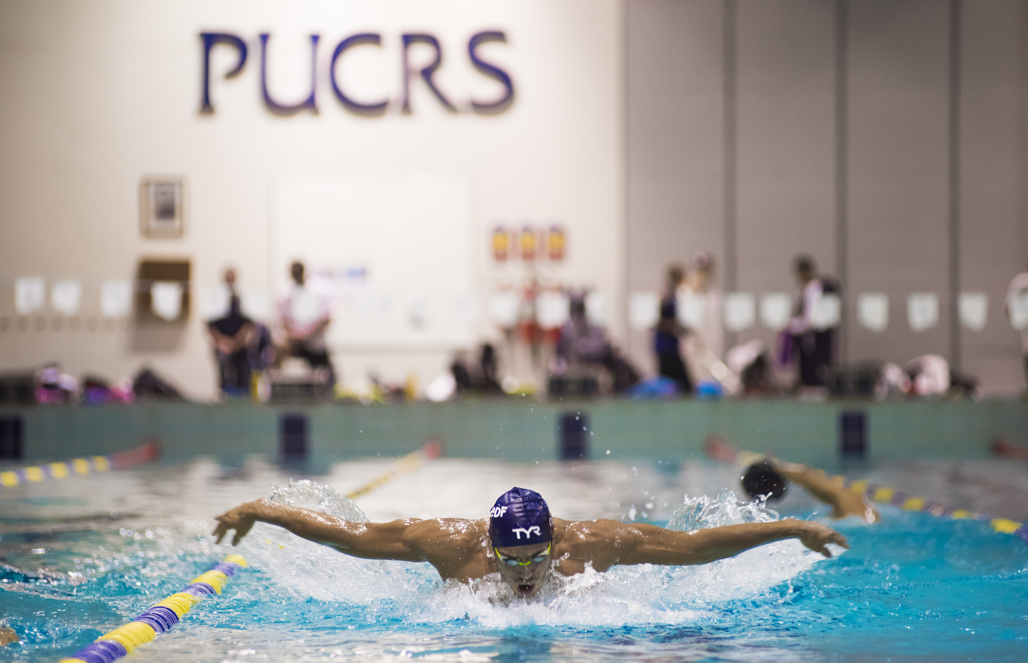 Piscina do Complexo Esportivo